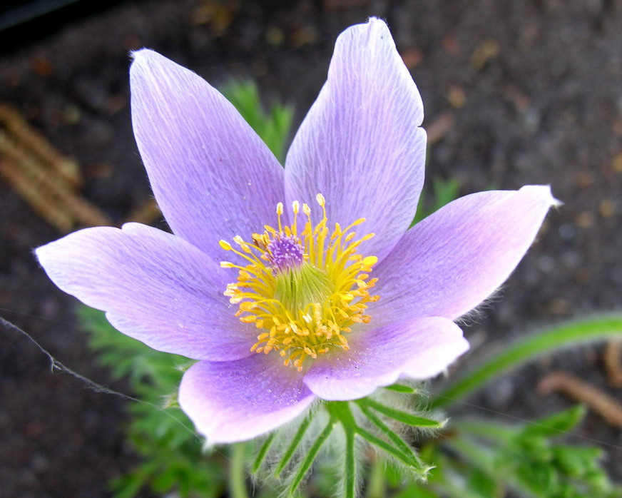 Paprastosios šilagėlės (Pulsatilla vulgaris) žiedas Šeima. Vėdryniniai (Ranunculaceae) Fotografavo: Algirdas, 2006 m. gegužės 10 d., Lietuva